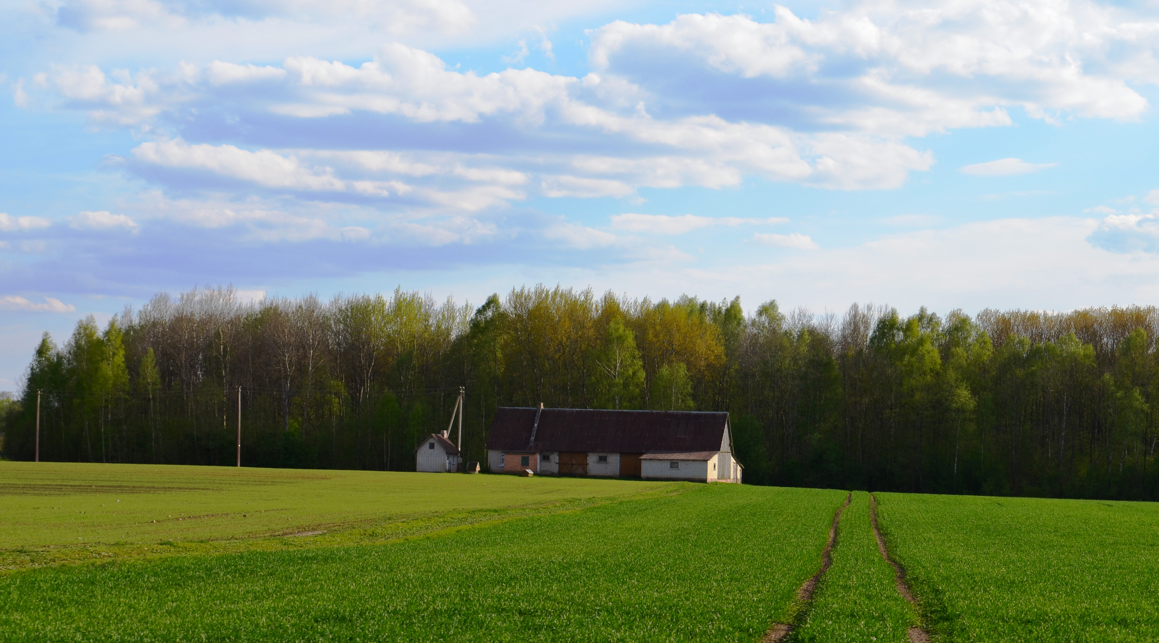 Pagilupio k., Kėdainių raj.